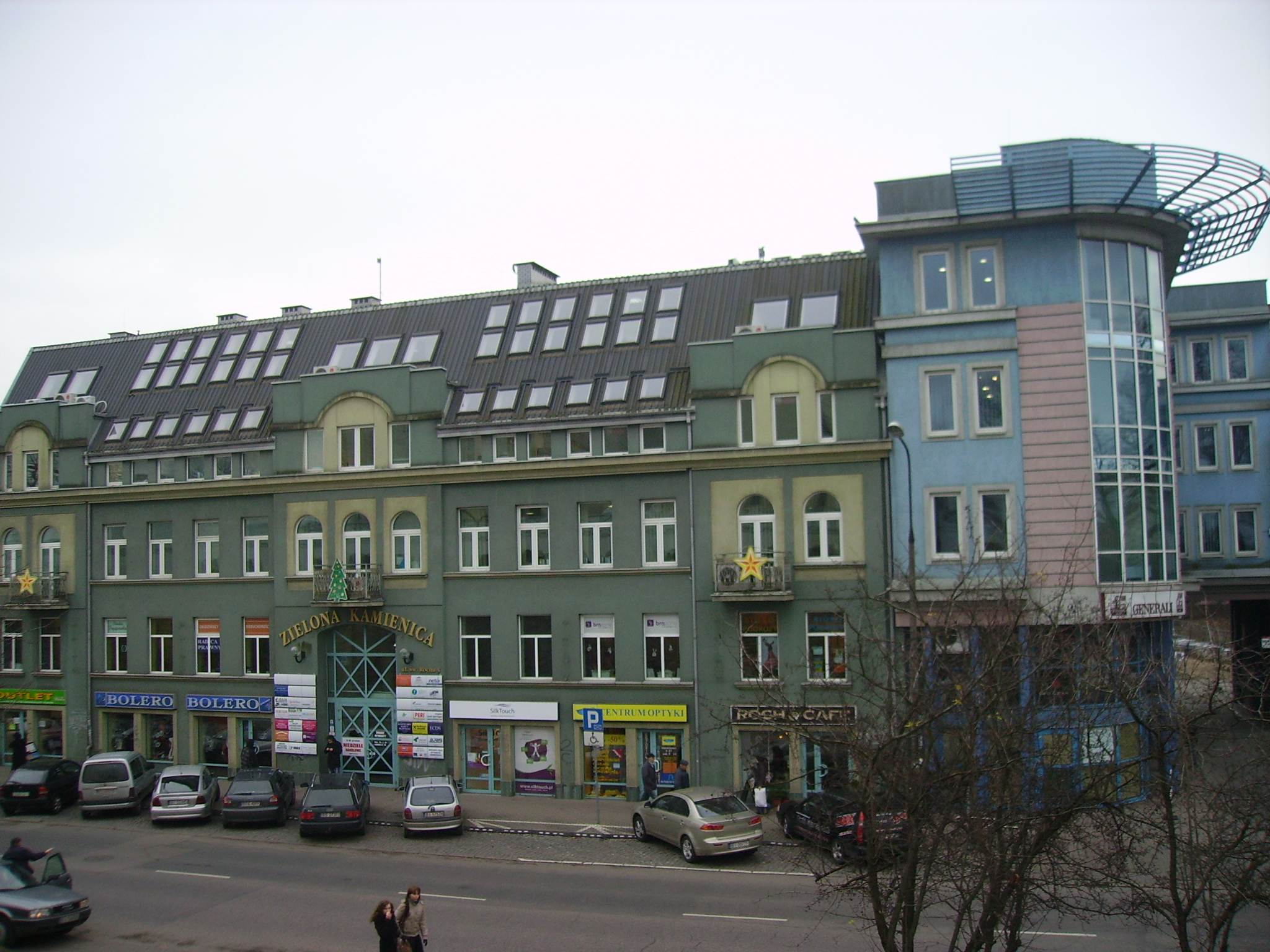 Białystok, ul. św. Rocha 5 - kamienica (Zielona Kamienica), k. XIX w. (zabytek nr A-333 z 22.02.1994)